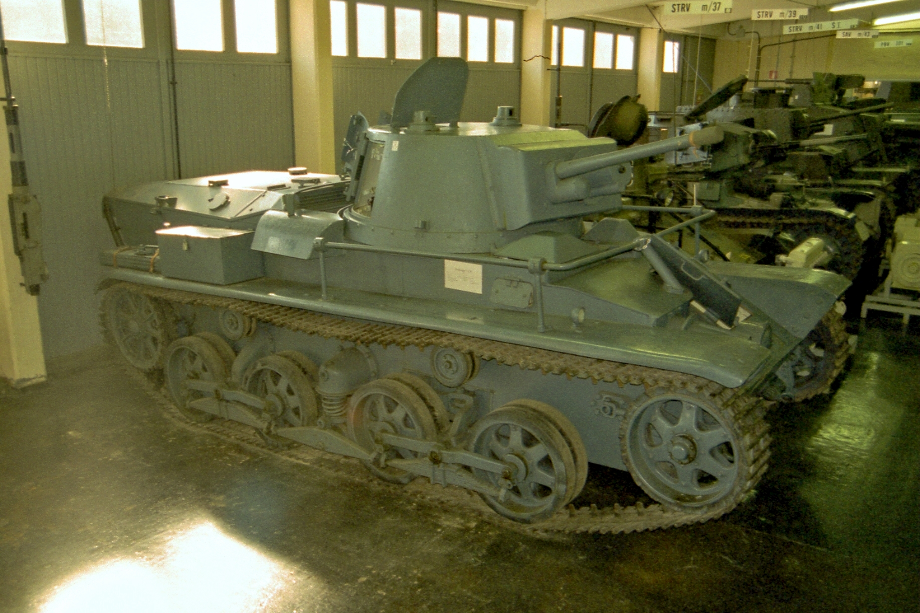 Stridsvagn m/31 i Pansarmuseet Axvall 17.08.2003